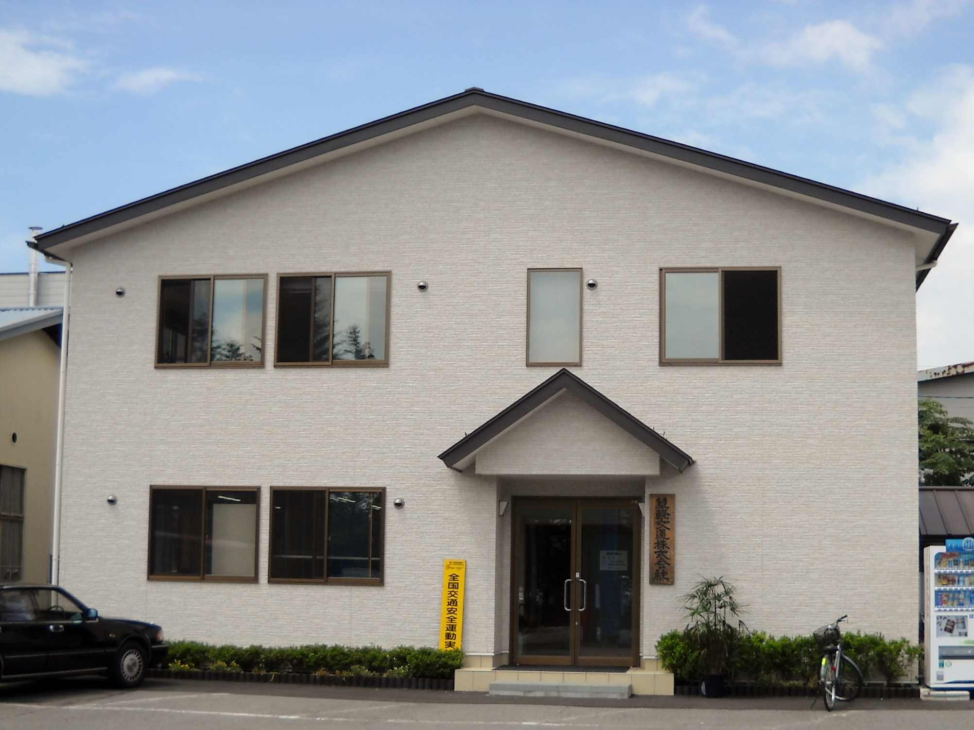 草軽交通株式会社本社（長野県北佐久郡軽井沢町）